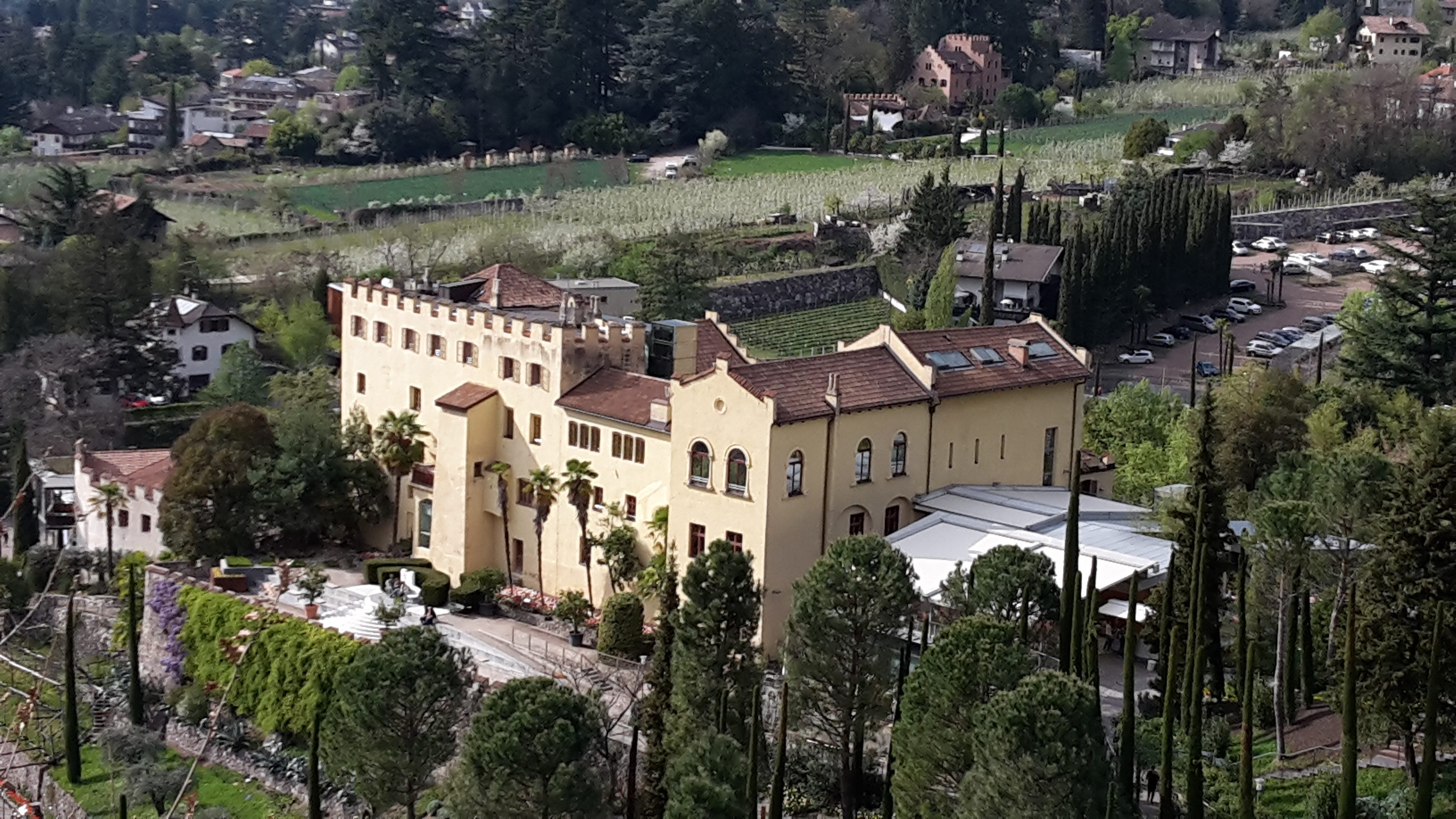 Trauttmansdorff Castle panorama